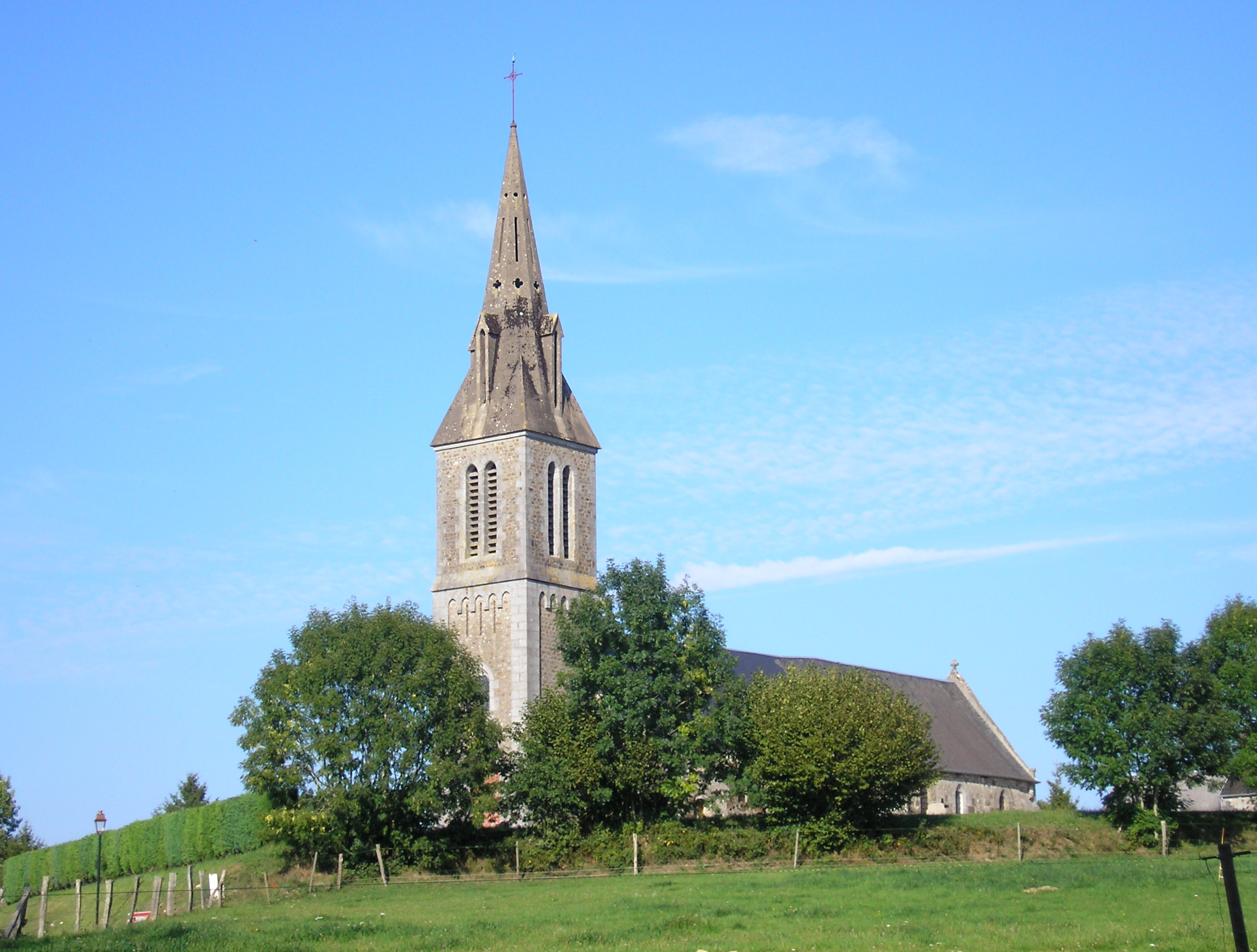 La Trinité (Normandie, France). L'église Sainte-Trinité.